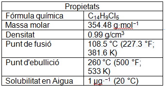 Imatge 9. Taula de les propietats químiques del DDT.